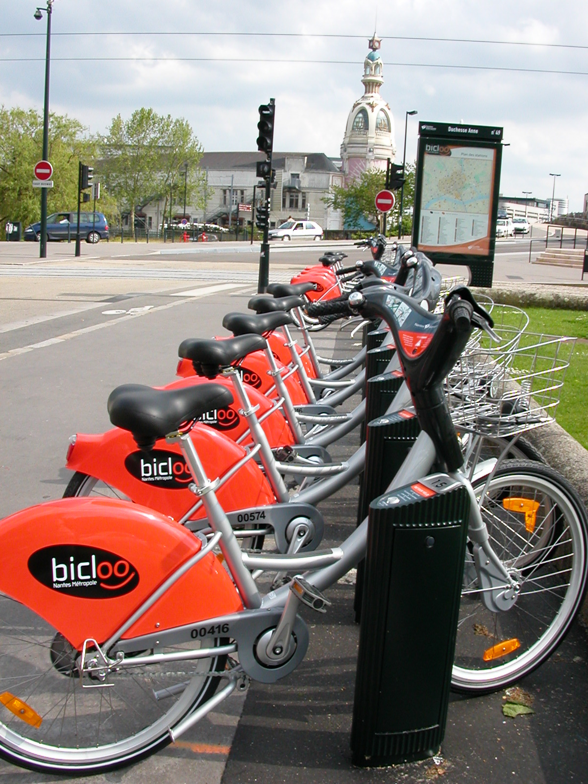 Bicloos tout neufs devant la Tour LU